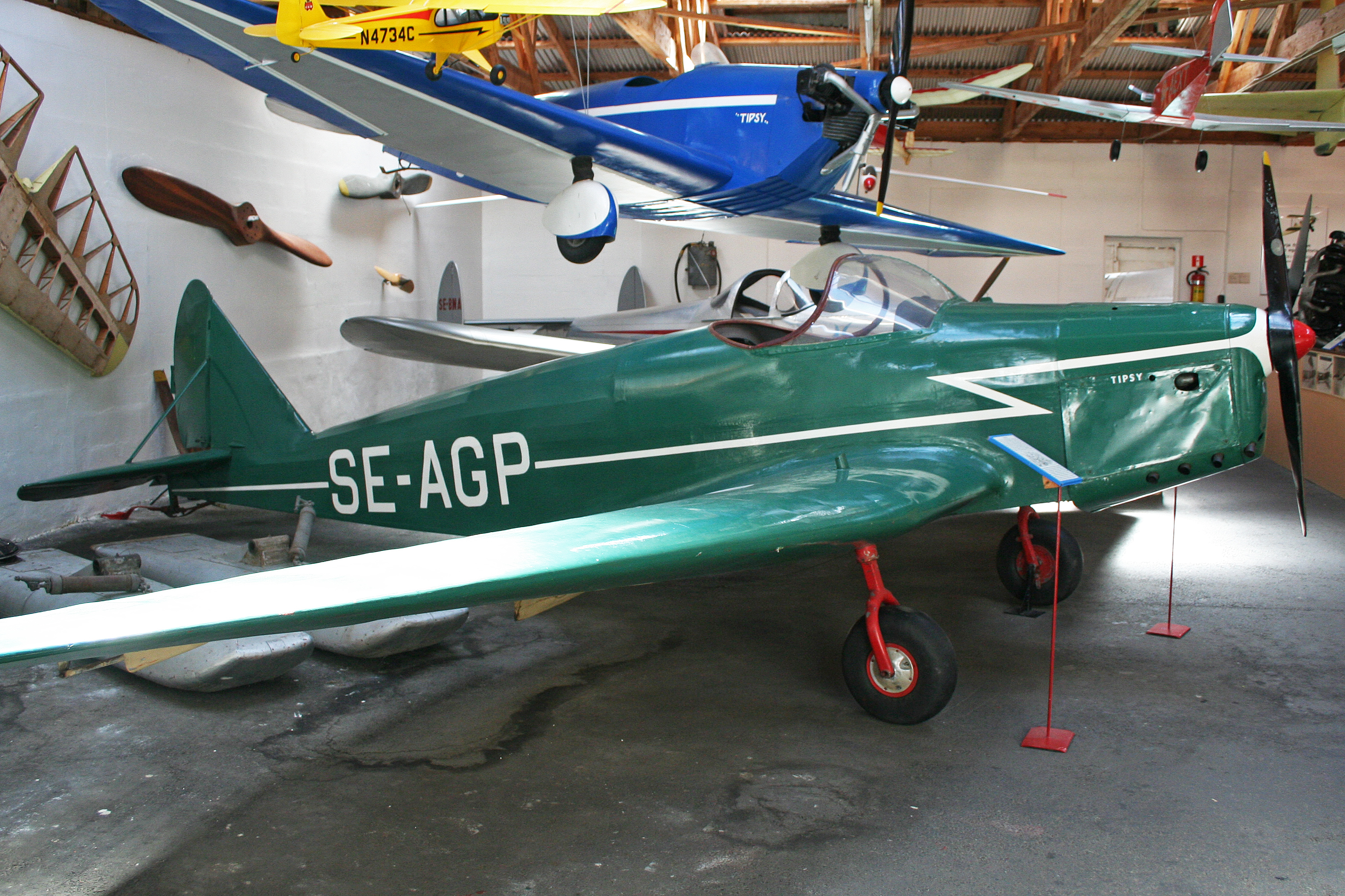 msn B504. Svedinos Museum, Ugglarp, Sweden. 02-6-2012